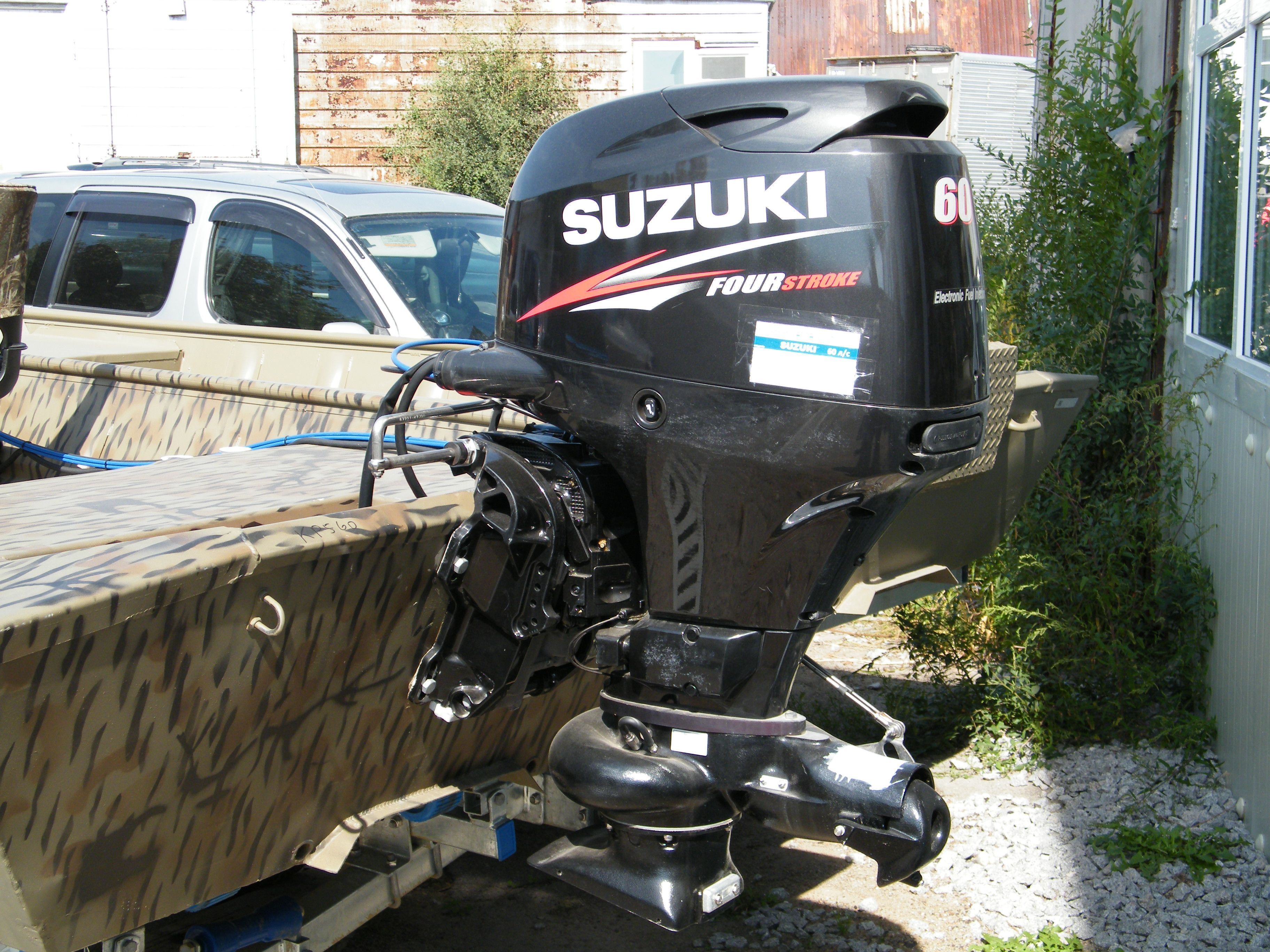 Сузуки-60 с водометом